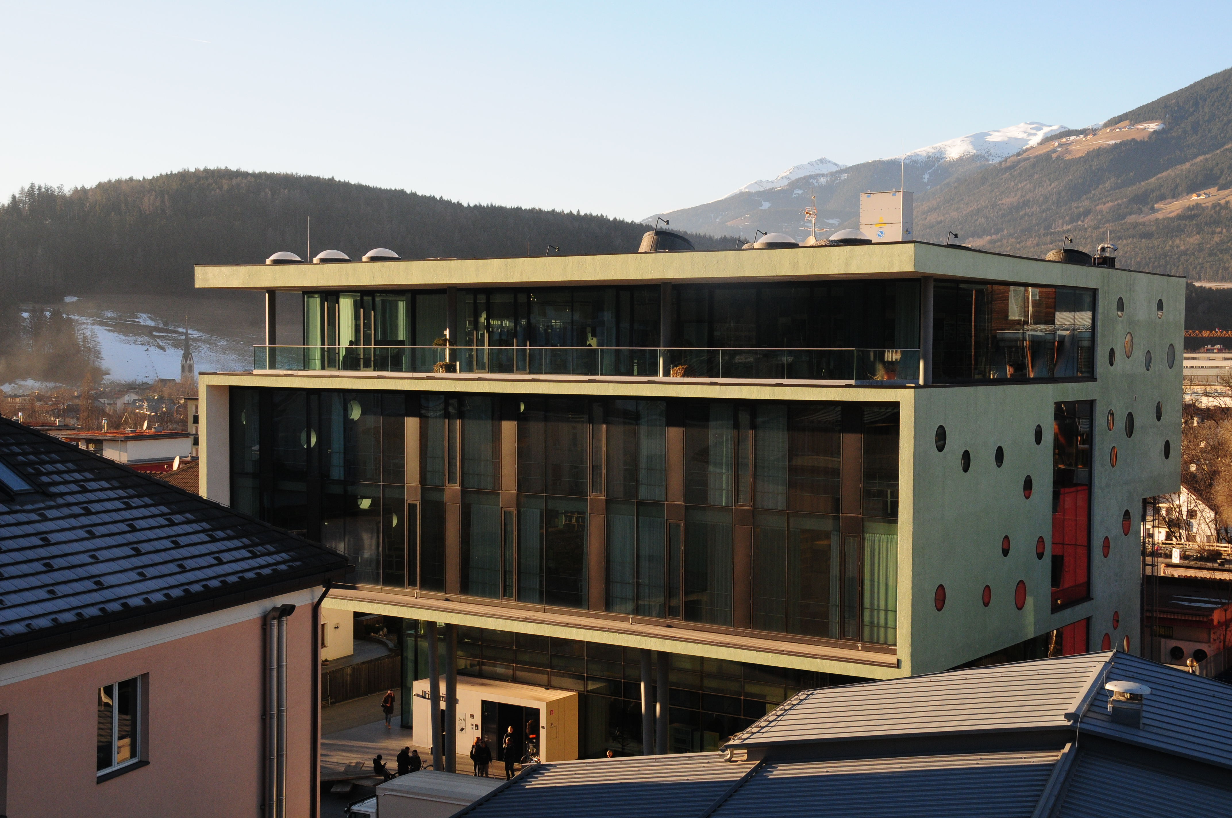 Außenansicht der Stadt- und Universitätsbibliothek in Bruneck